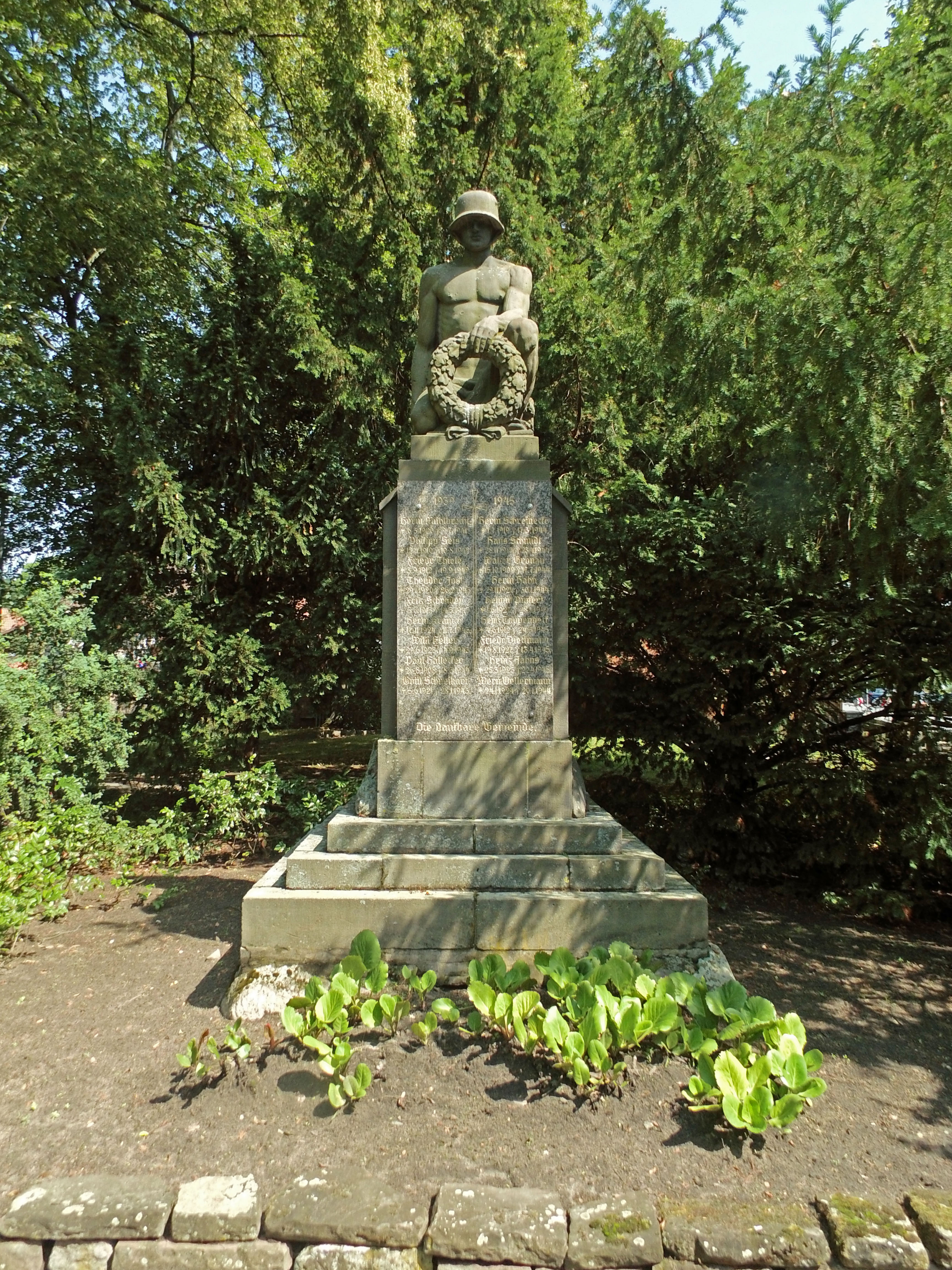 Kriegerdenkmal in Sandkamp, Ortsteil von Wolfsburg